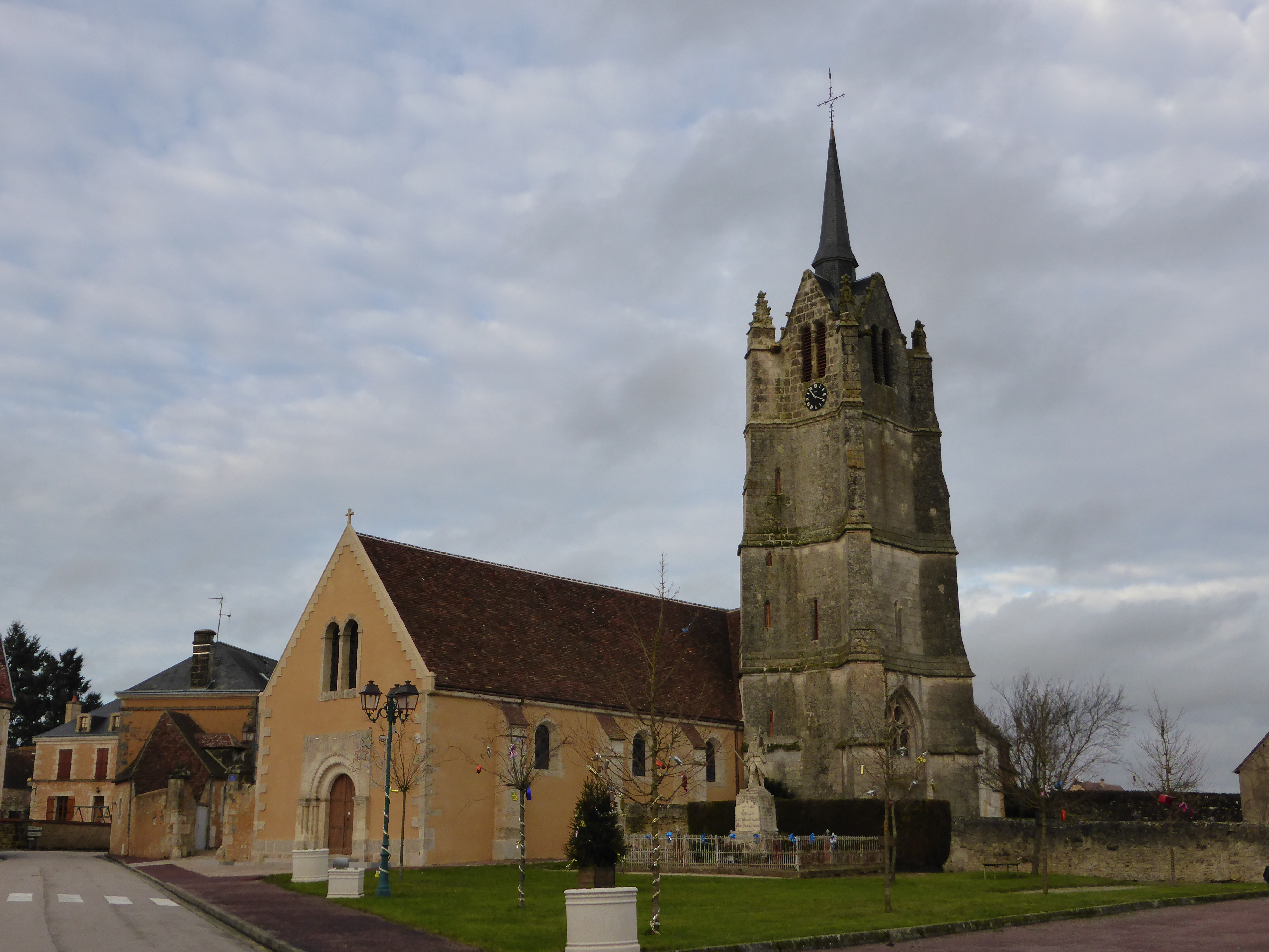 Église Saint-Martin de Réveillon, dans l'Orne, en France.